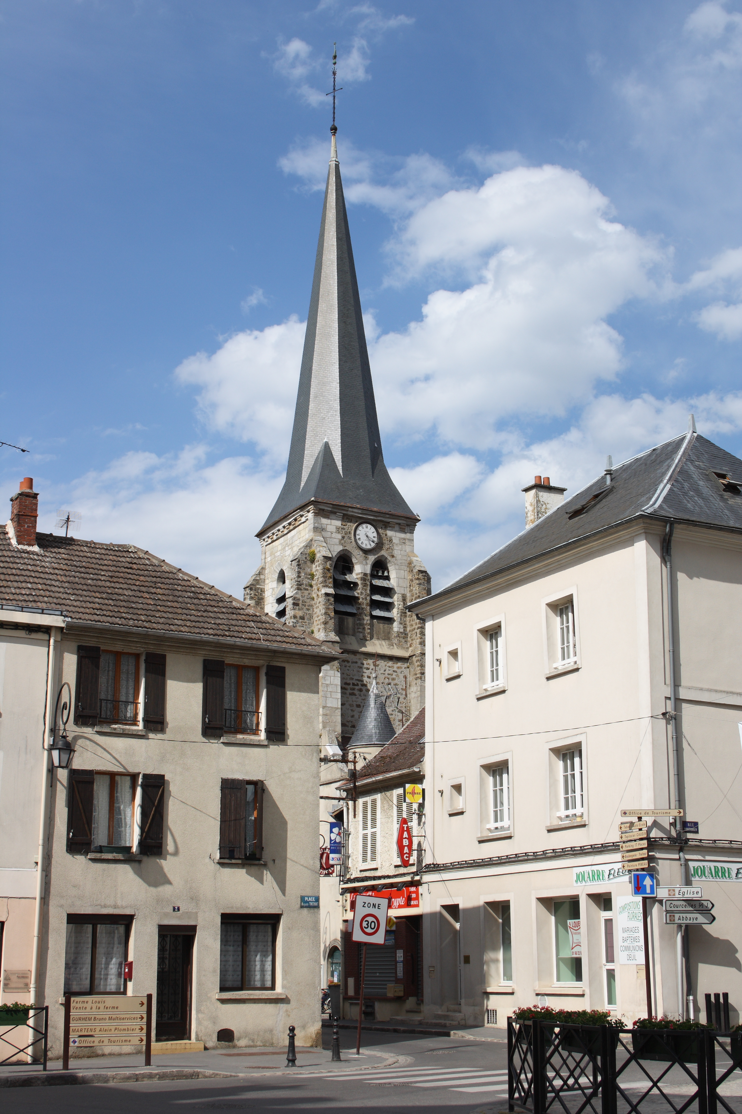 katholische Pfarrkirche Saint-Pierre-et-Saint-Paul in Jouarre